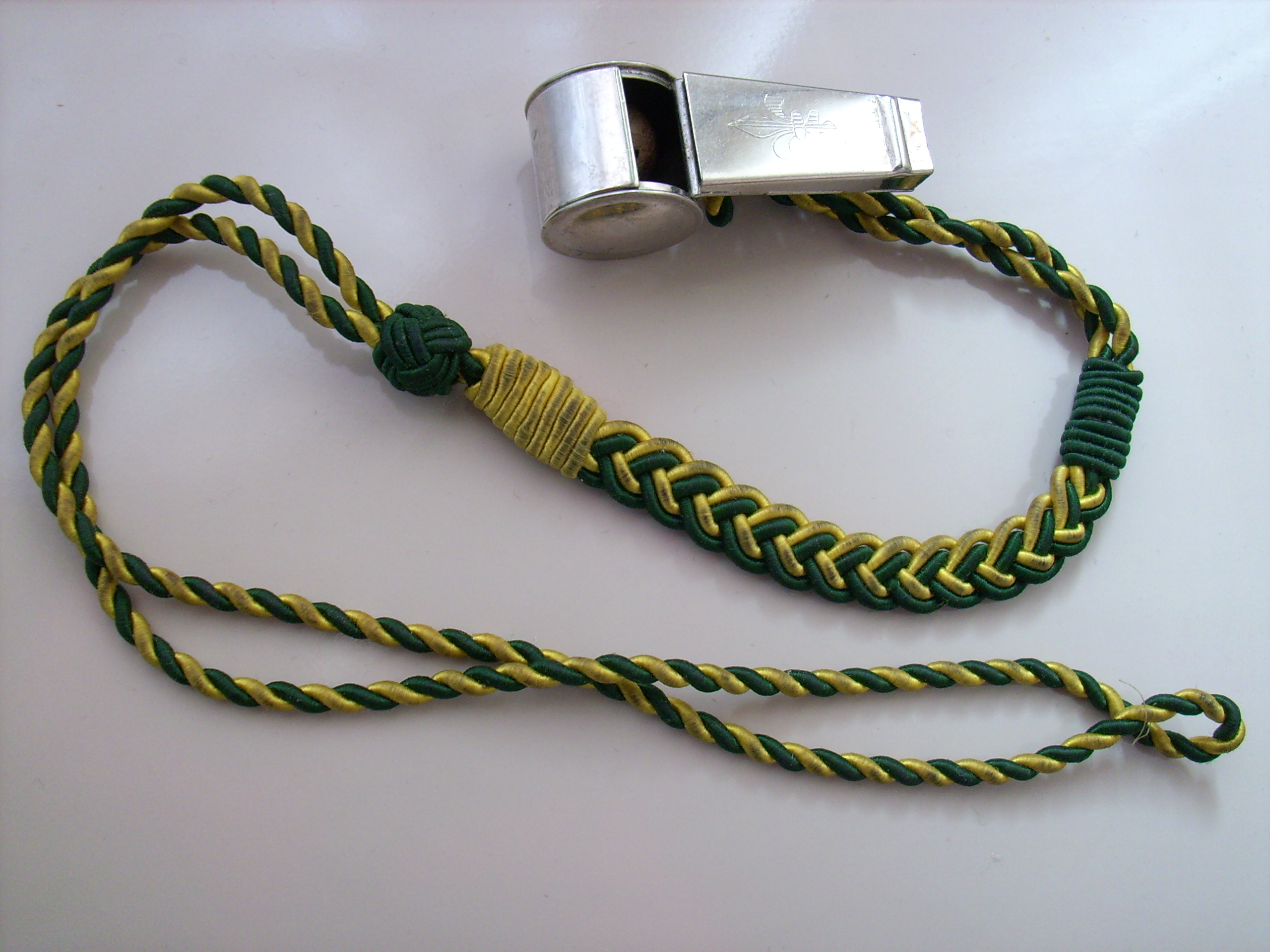 Pfeifenschnur mit Pfeife, Pfadfinder Schweiz